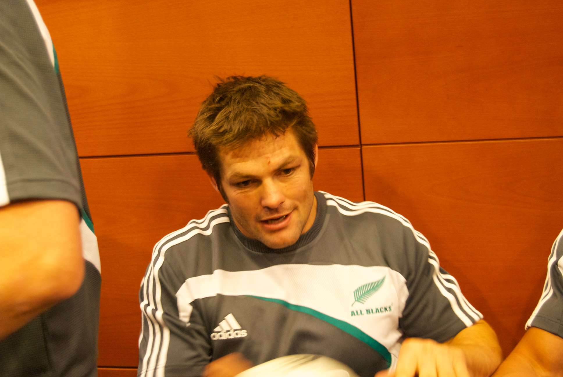 Capitano Coraggioso! Richie McCaw.